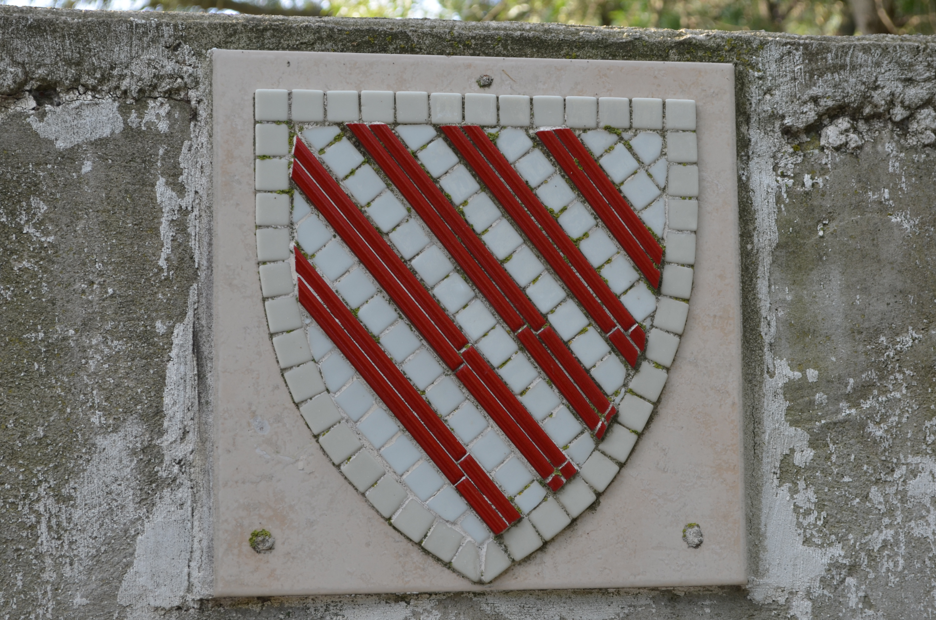 Les armoiries de la famille Baroncelli-Javon.